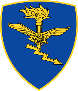 Scudetto della Brigata Aviazione dell'Esercito.